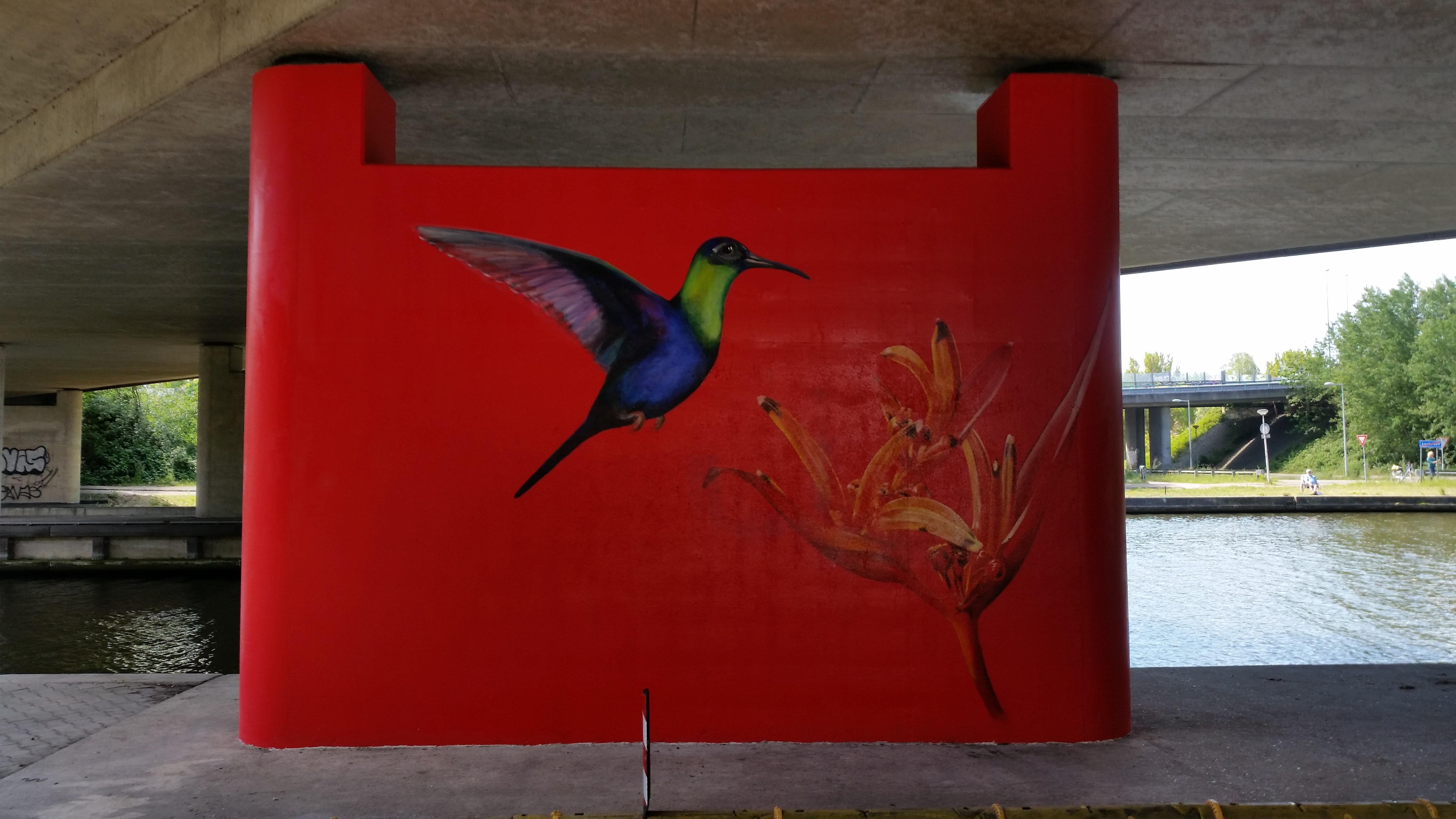 Impressie van Brug 1269 over de Weespertrekvaart in de Gooiseweg met beschilderingen